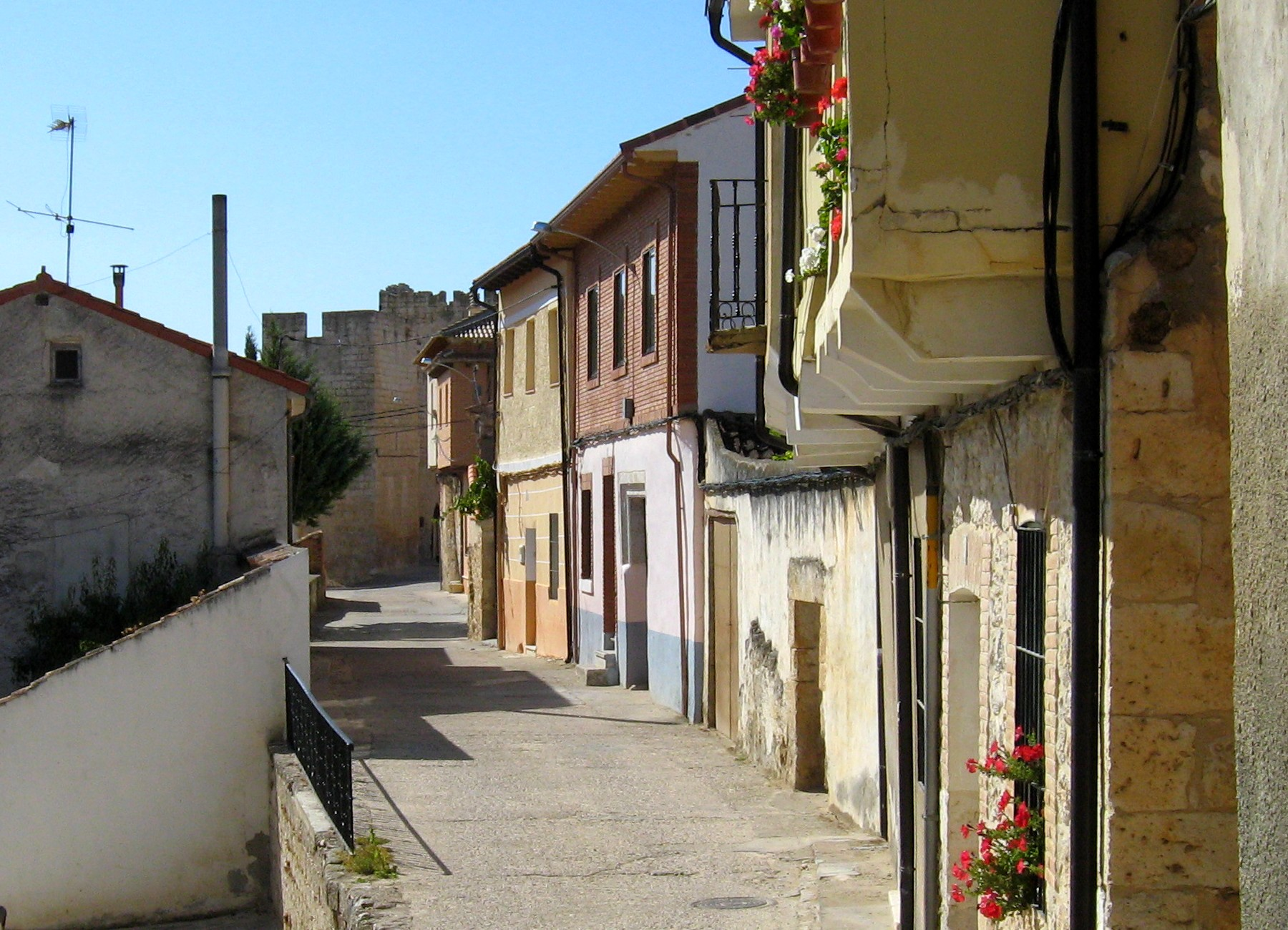 Curiel de Duero. Calle. Palacio de Zúñiga al fondo. Valle del Cuco. Valladolid